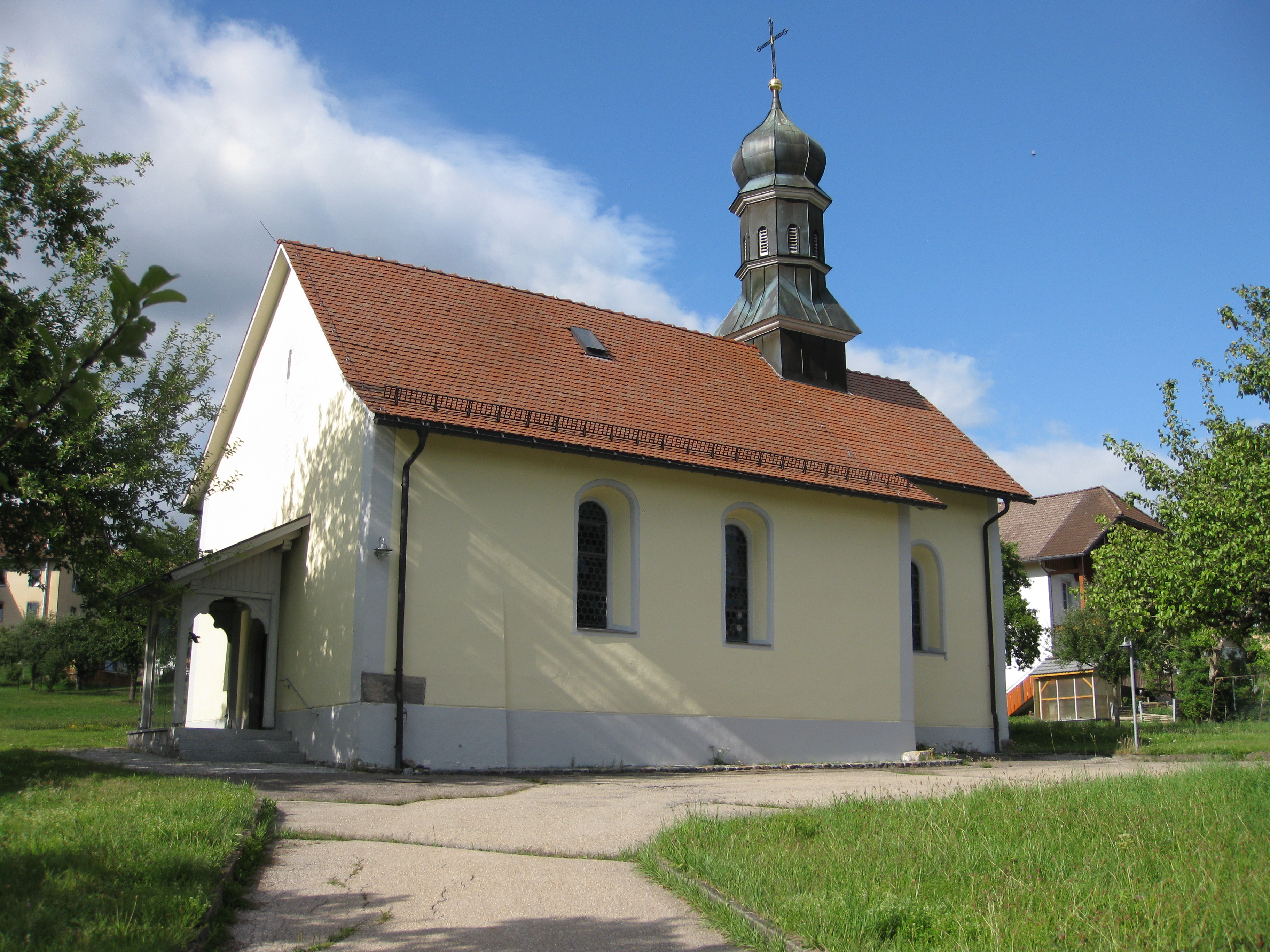 Kapelle St. Nikolaus in Wittlekofen einem Ortsteil der Stadt Bonndorf im Schwarzwald